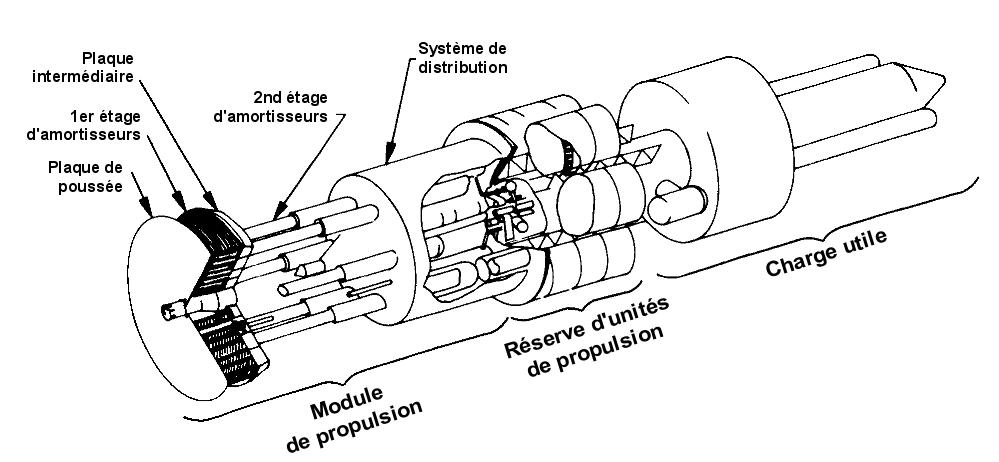 Schéma de conception globale du véhicule Orion